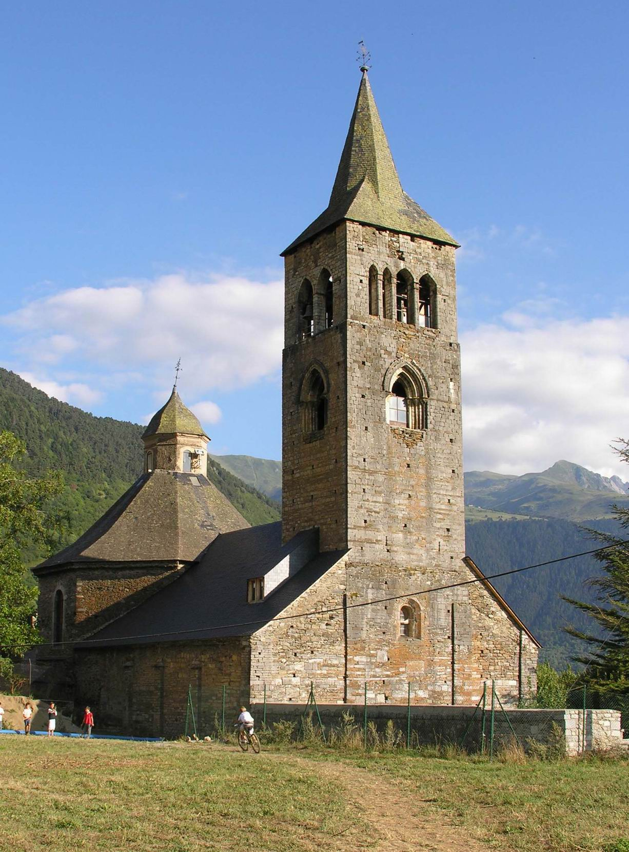 Façana de ponent de Sant Feliu de Vilac. Agost 2006